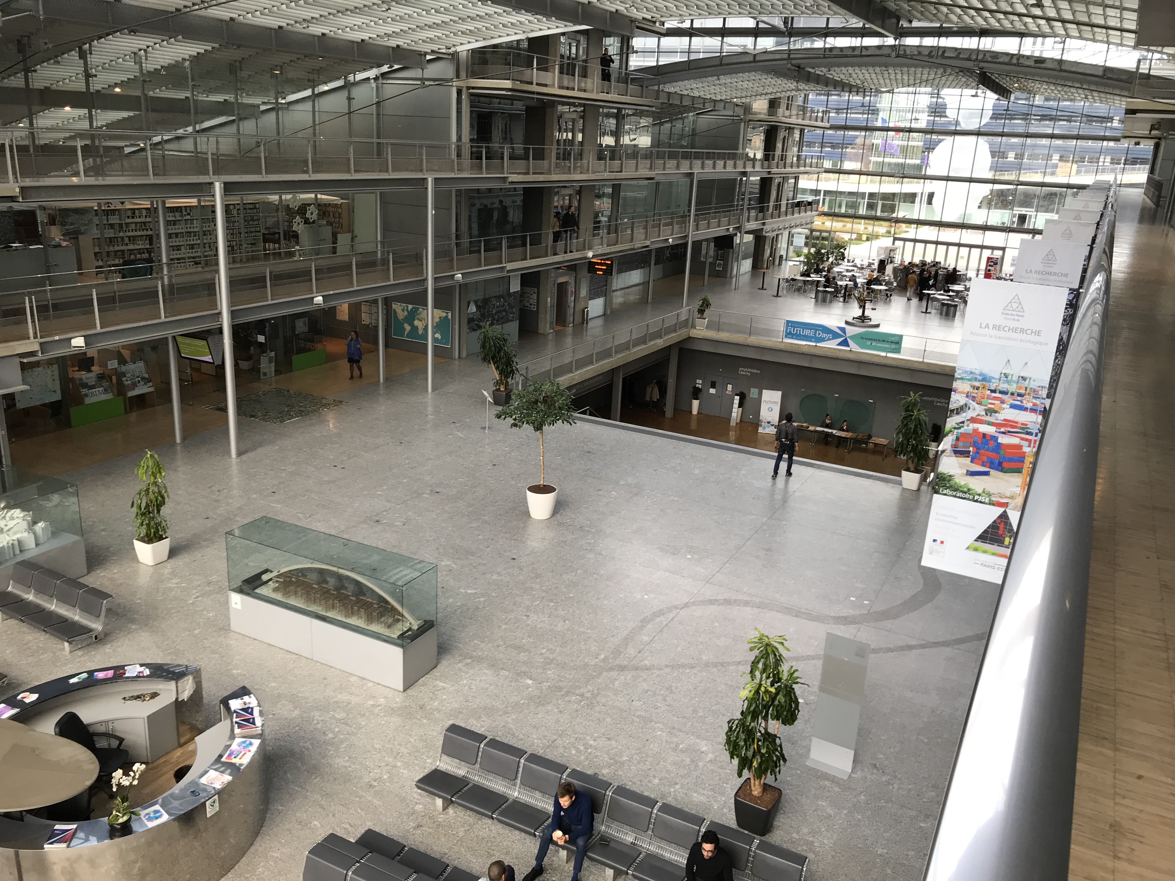 Hauptgebäude der École des Ponts Paris Tech